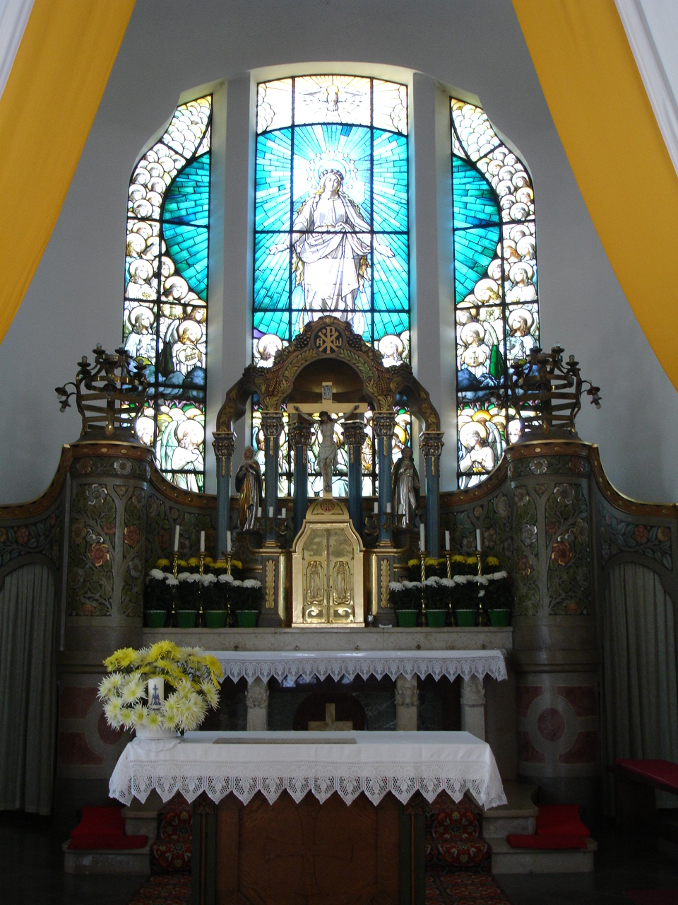 Hochaltar der Jugendstilkirche in Dietelskirchen, Landkreis Landshut